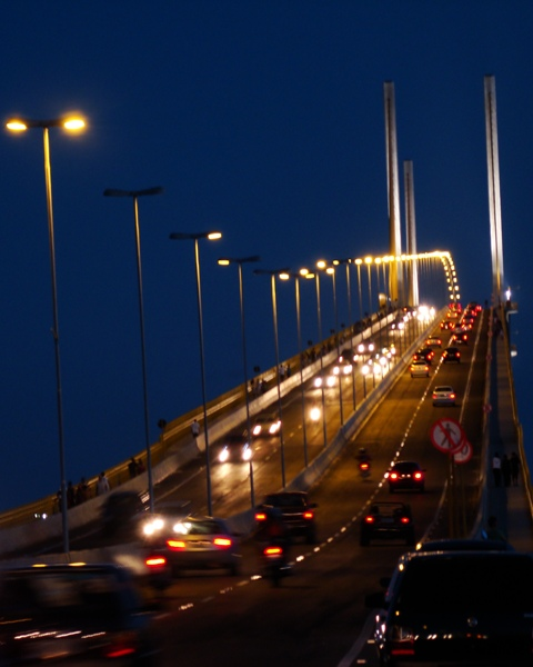 Ponte Newton Navarro, Natal, Brazil.